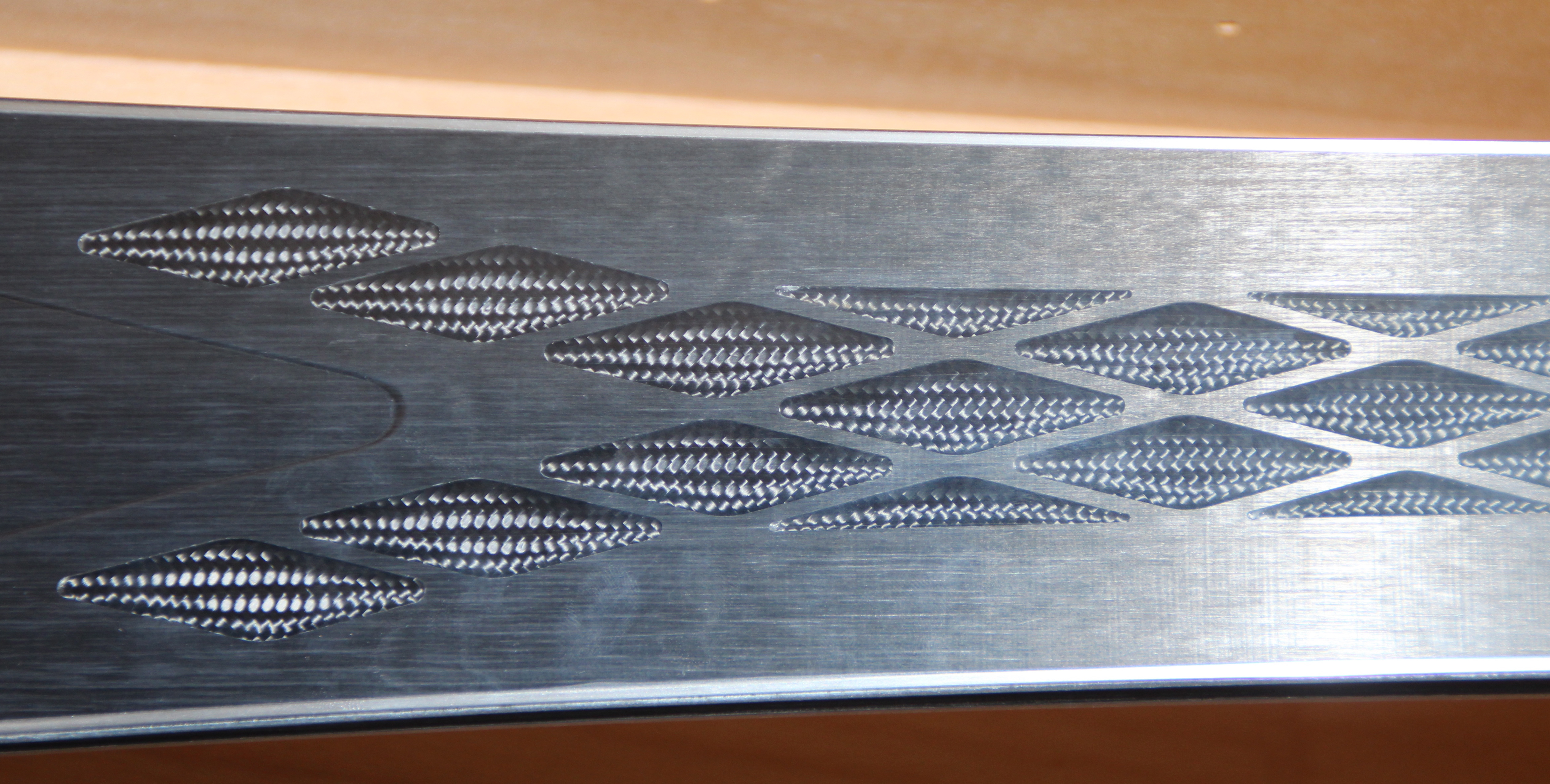 zai Sichtbare Carbonfasern Modell bentley